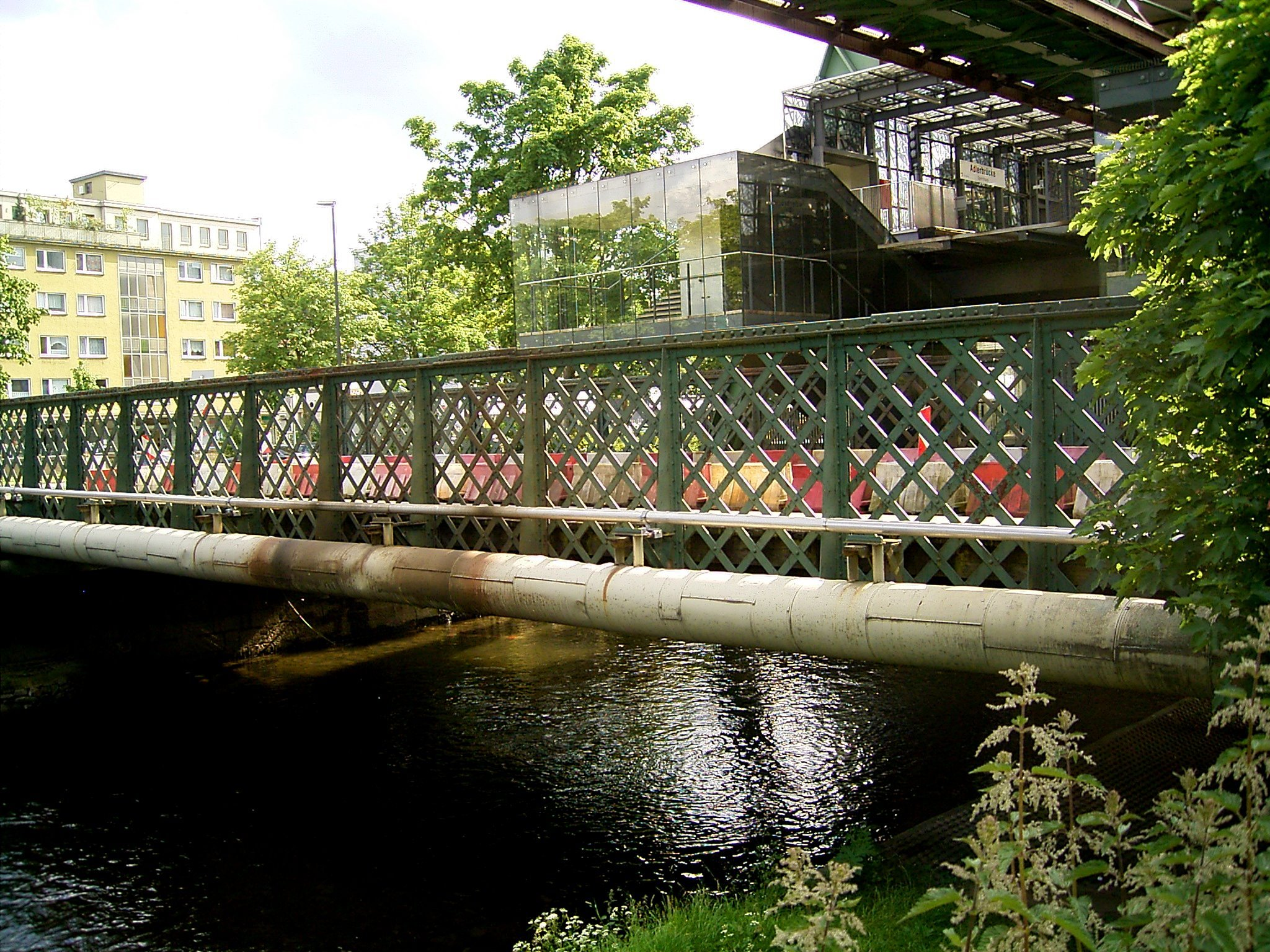 Adlerbrücke über die Wupper in Wuppertal